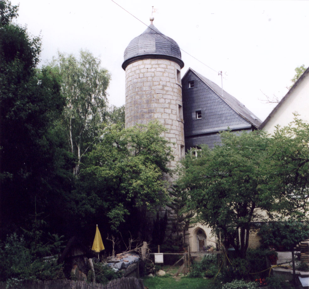 Burg Kohlstein, Hauptgebäude mit Treppenturm